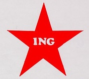 ING logo